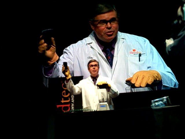 Tom Dickson.